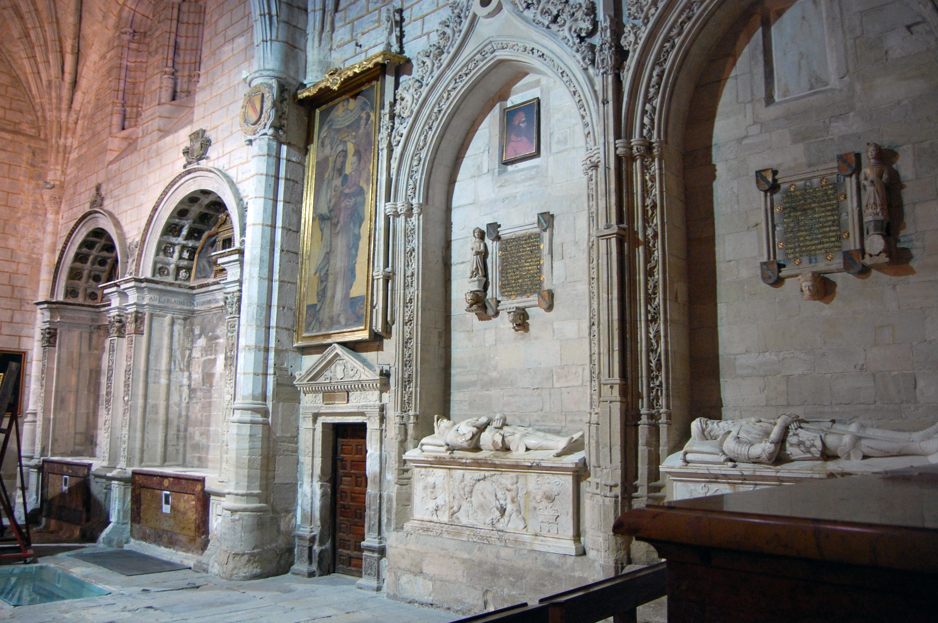 Capilla de los Caballeros de la catedral de Cuenca, lugar de enterramiento de la familia Albornoz.